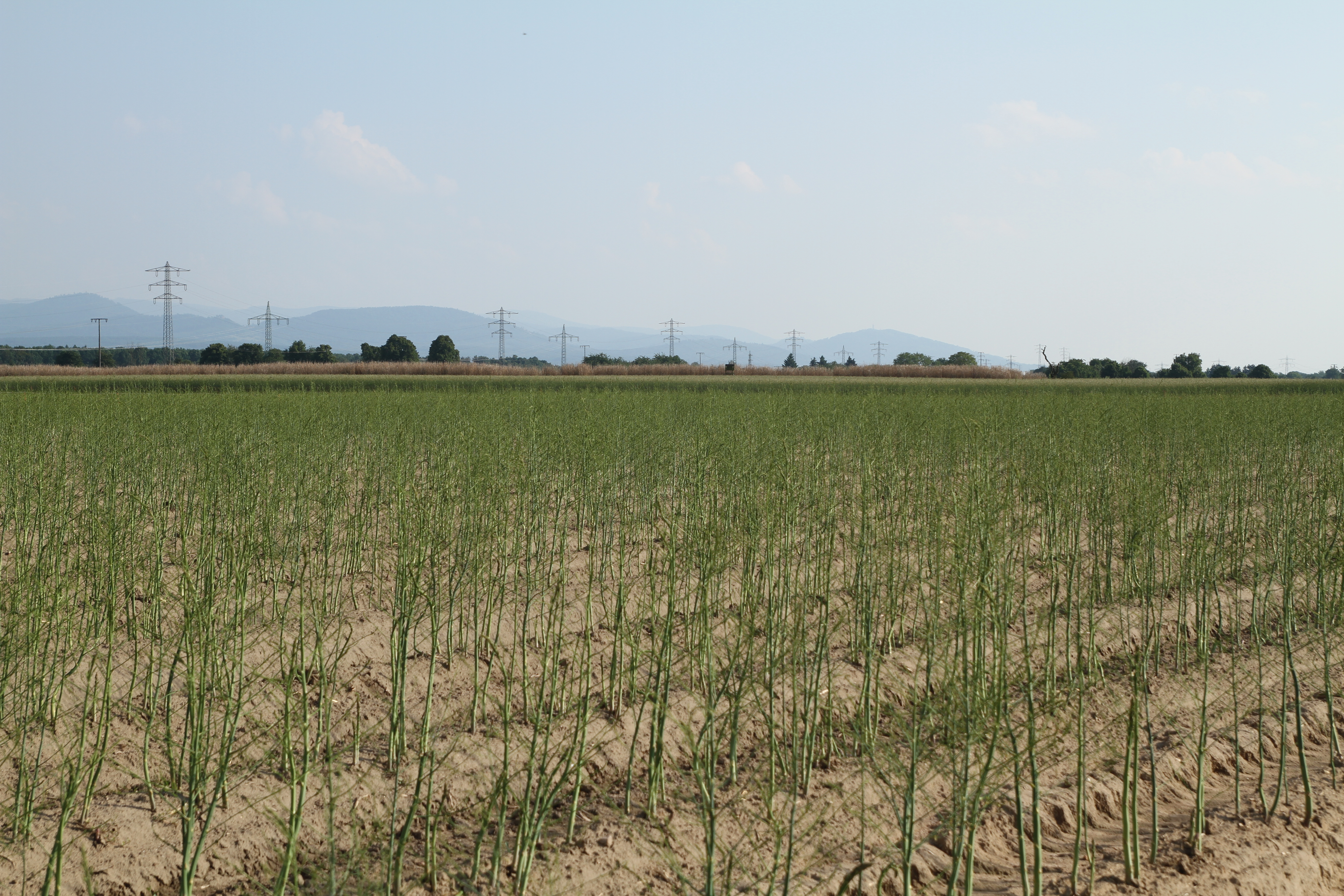 Ein Spargelfeld im badischen Bietigheim.